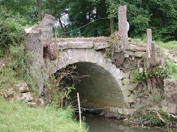 Le pont de Coq - Vue du nord-ouest, le 25 juin 2003 - Présence de végétation dangereuse pour la structure - Restauration achevée en 2014.